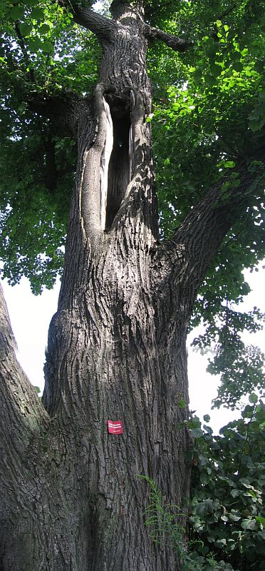 Lipa dobiecka w Dąbrowie Górniczej